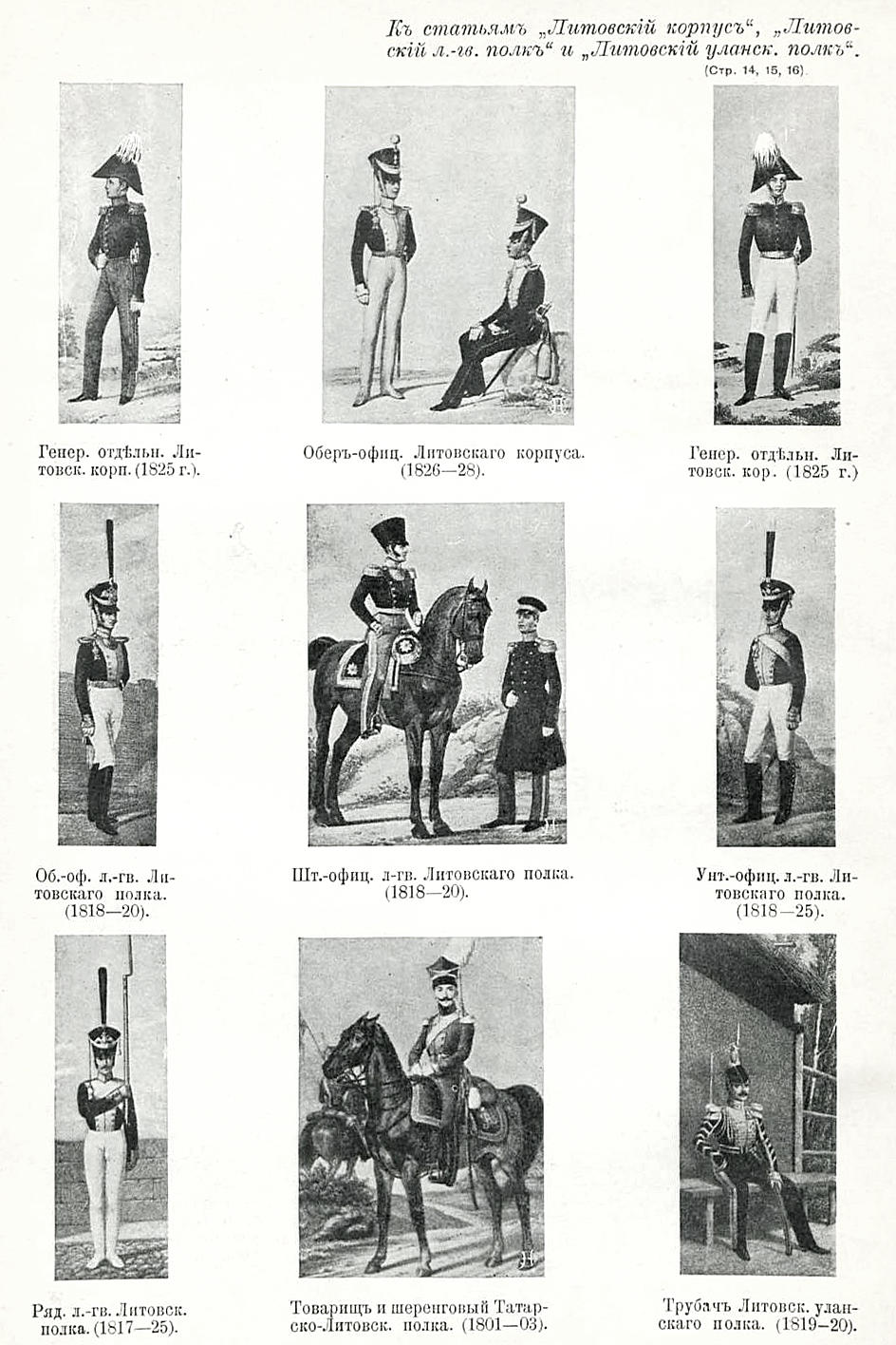 Эти рисунки были использованы для иллюстрирования статей: «Литовский, 5-й уланский, Его Величества короля Виктора-Эммануила, полк», «Литовский, лейб-гвардии, полк» и «Литовский отдельный корпус» опубликованных в пятнадцатом томе «Военной энциклопедии», который был издан книгоиздательским товариществом И. Д. Сытина в 1914 году в столице Российской империи городе Санкт-Петербурге. Более подробное описание к этим изображениям можно прочесть в указанных выше статьях на сайте Русской Викитеки.